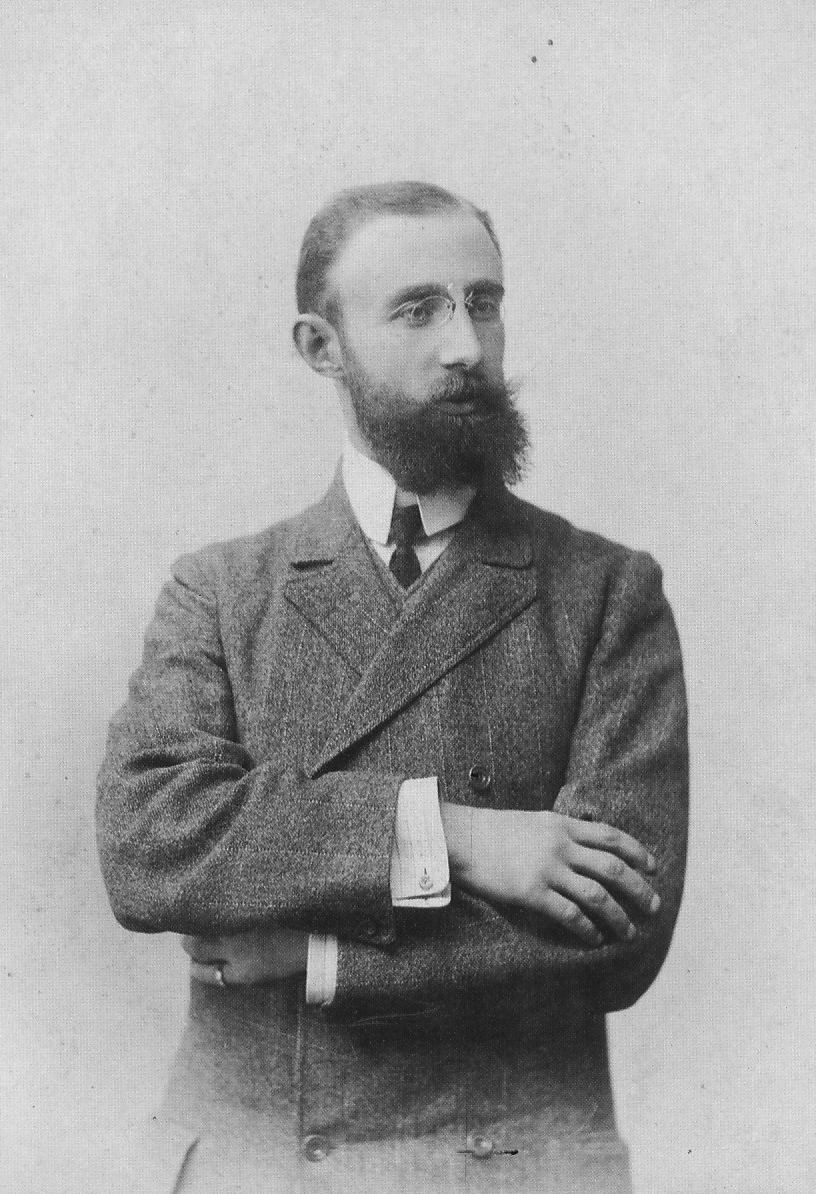 Federico Morassutti, imprenditore italiano attivo nel commercio di ferramenta e legname, 1900 ca